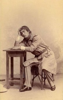 Császár Imre (1864-1933) ismeretlen szerepben